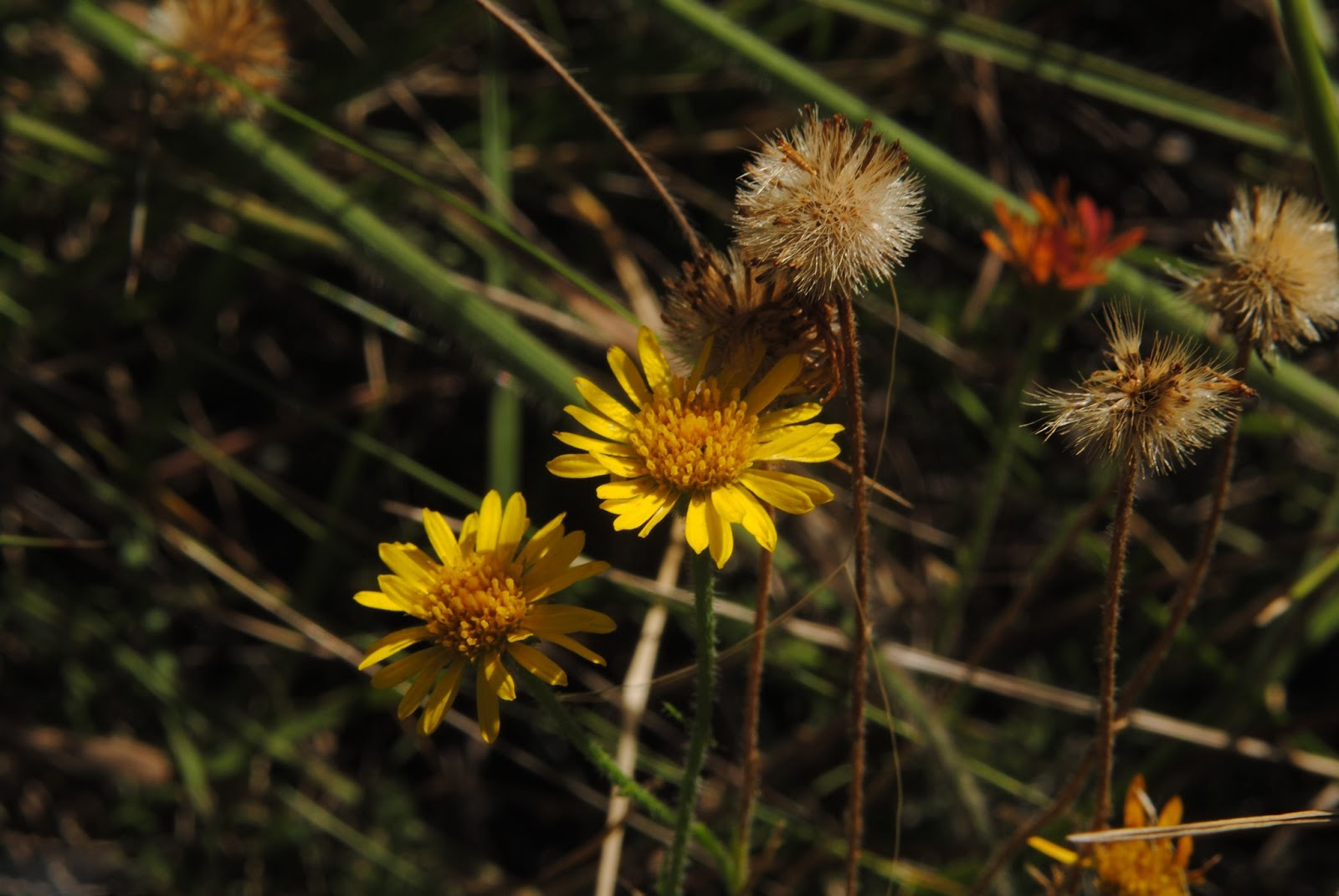 Hysterionica filiformis. Asteraceae. Fotos tomadas entre gramíneas en suelo pedregoso al margen de camino hacia la Quebrada de los Cuervos, departamento de Treinta y Tres, Uruguay.